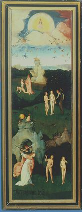 Triptychon von Hieronymus Bosch